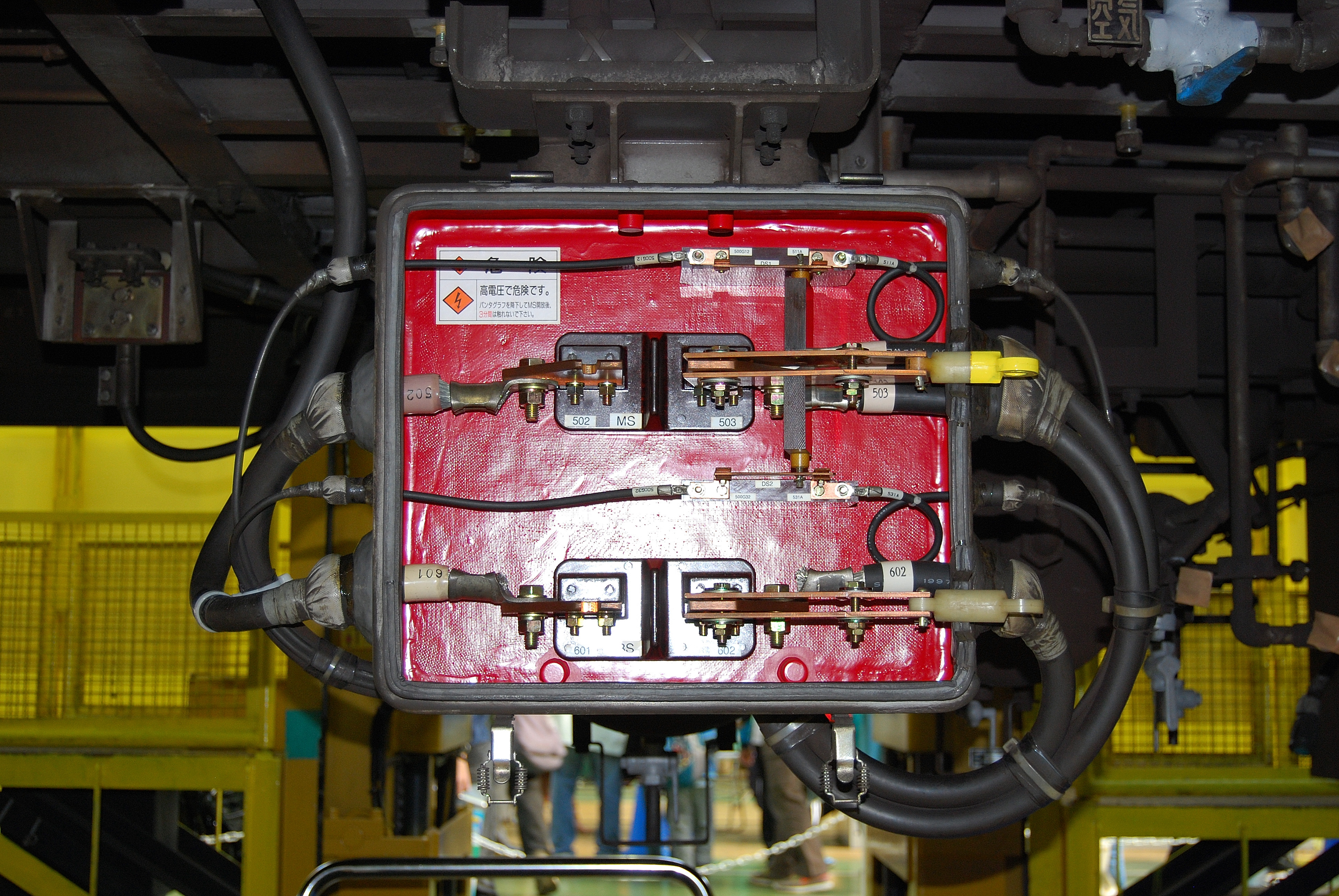 東京メトロ6000系の主開閉器（スマイルフェスタ2010イベントでの綾瀬車両基地開放時に撮影）